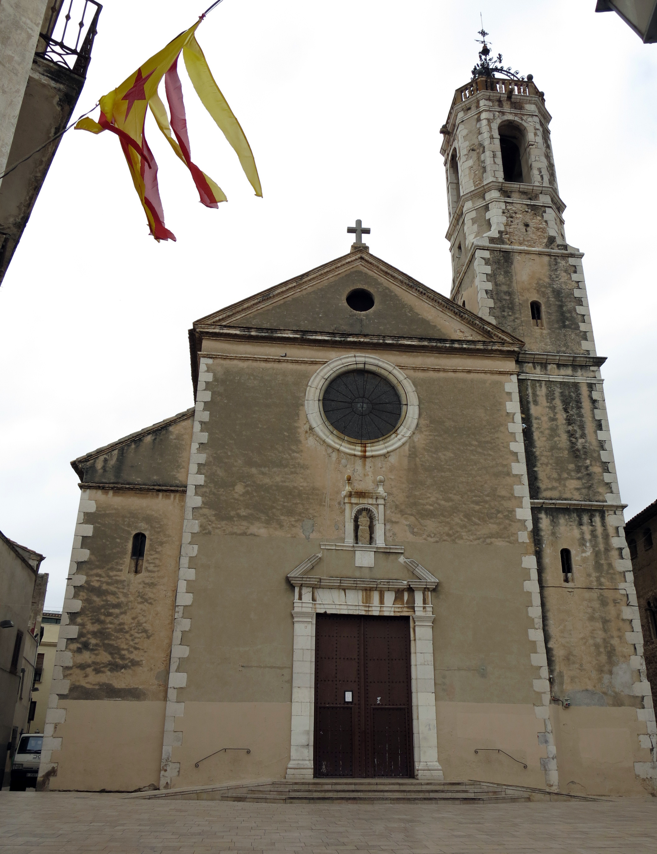 Església parroquial de Santa Maria de la Geltrú (Vilanova i la Geltrú).